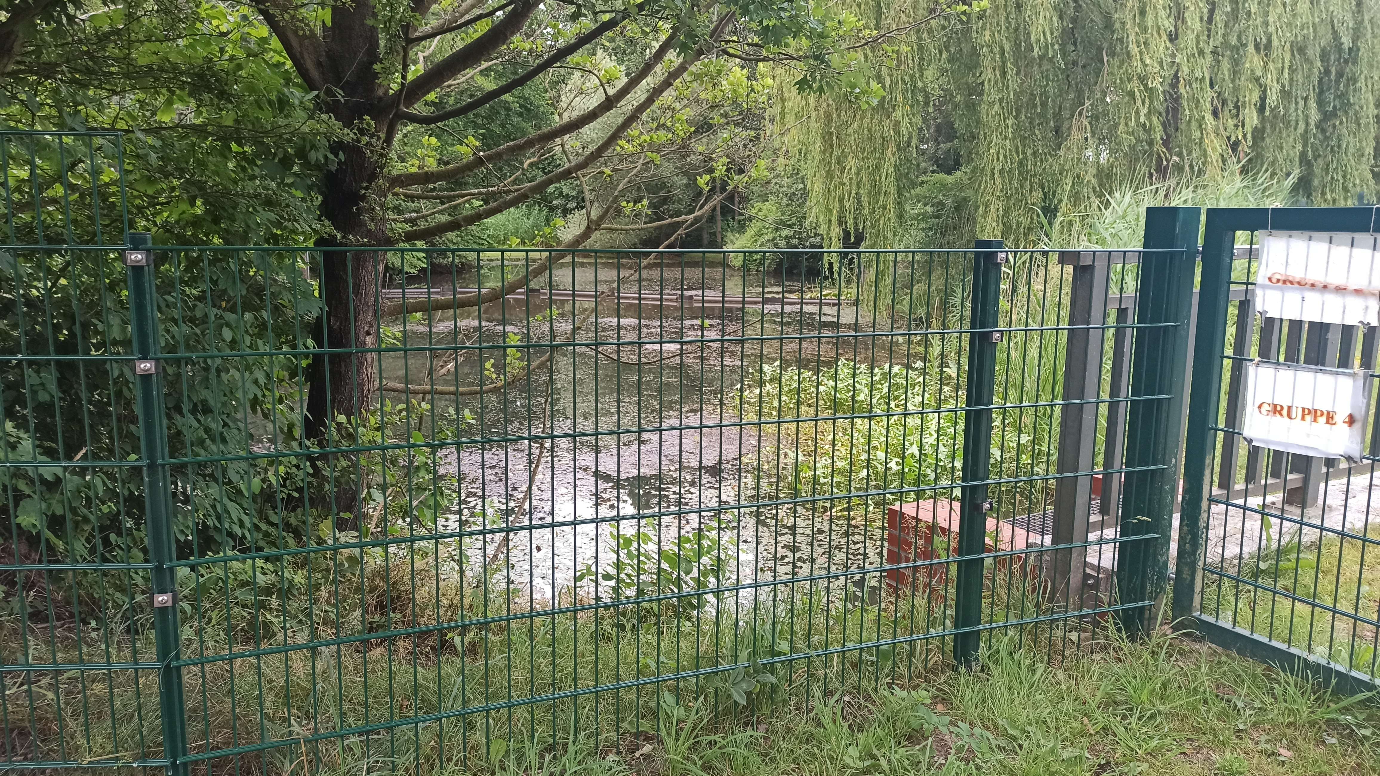 Rückhaltebecken am Langennhorstgraben